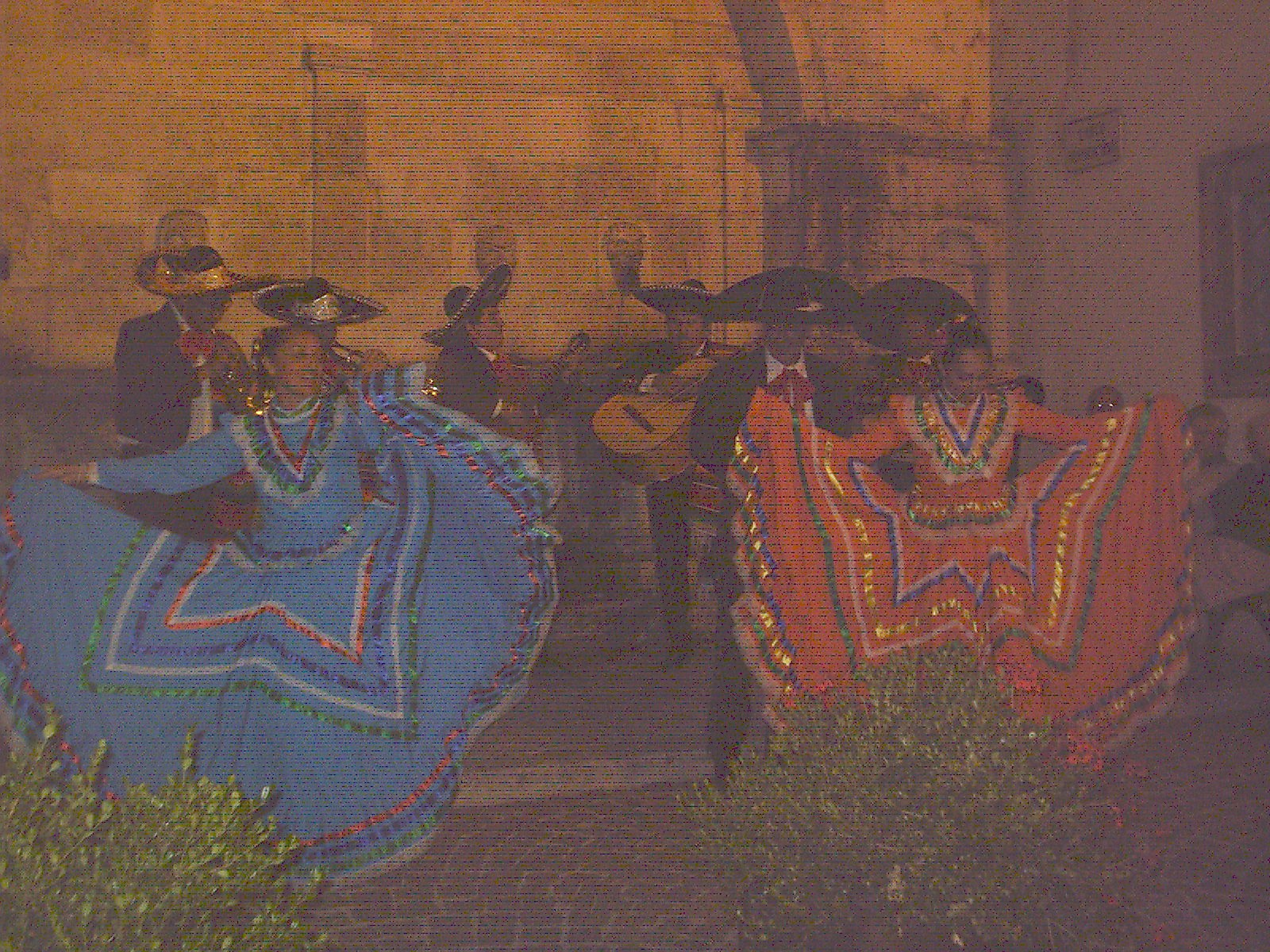 Festa davanti alla Fontana Sarracco di notte, Scanno, L'Aquila